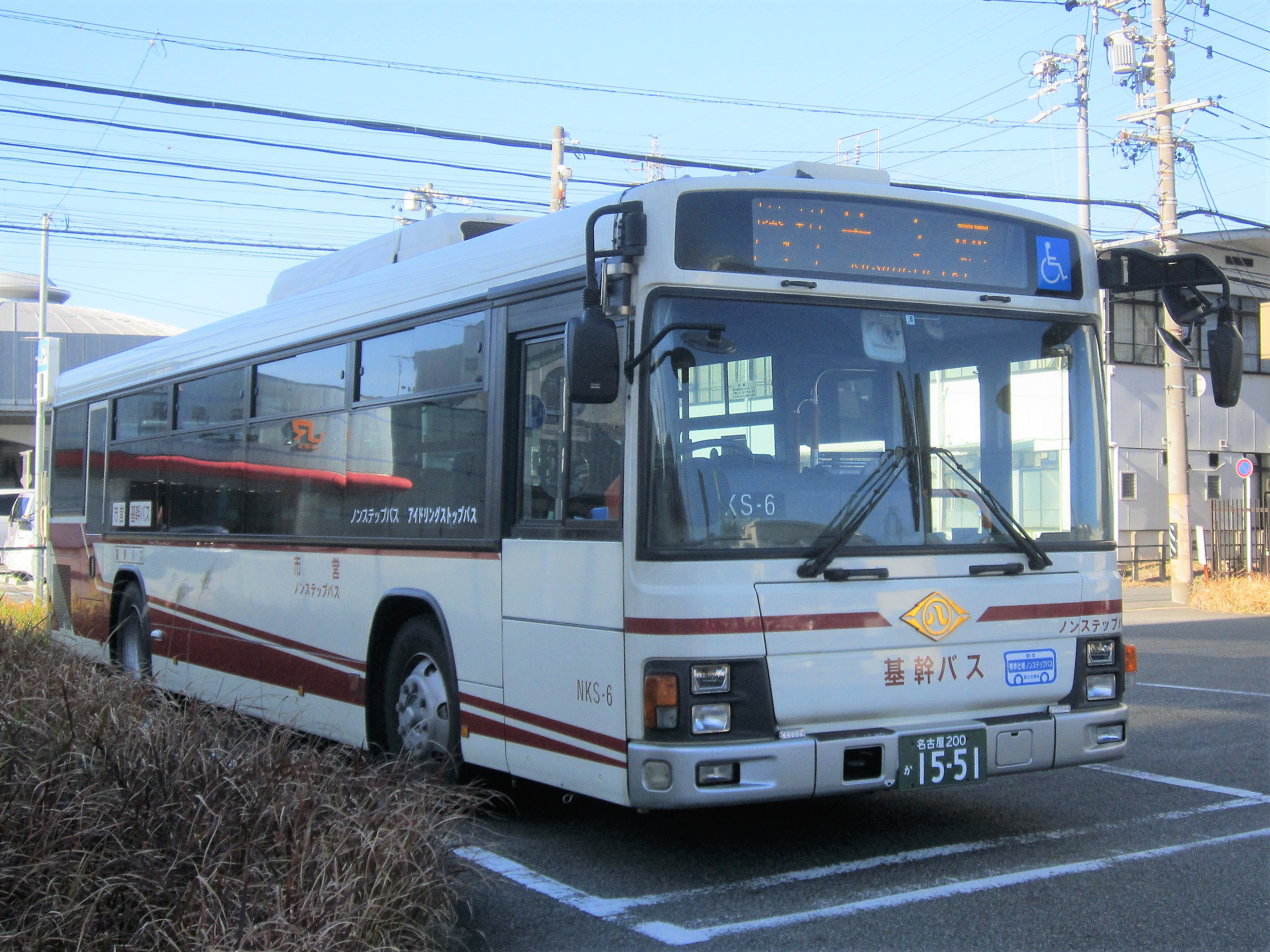 笠寺駅前に停車中の名古屋市営バス（基幹バス）